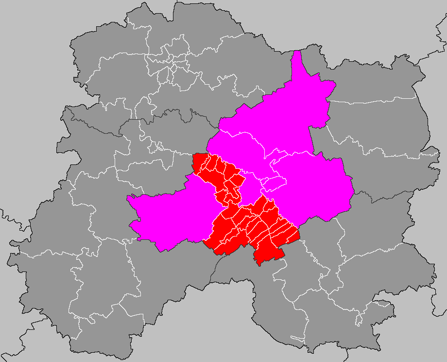 Localisation du canton d'Écury-sur-Coole